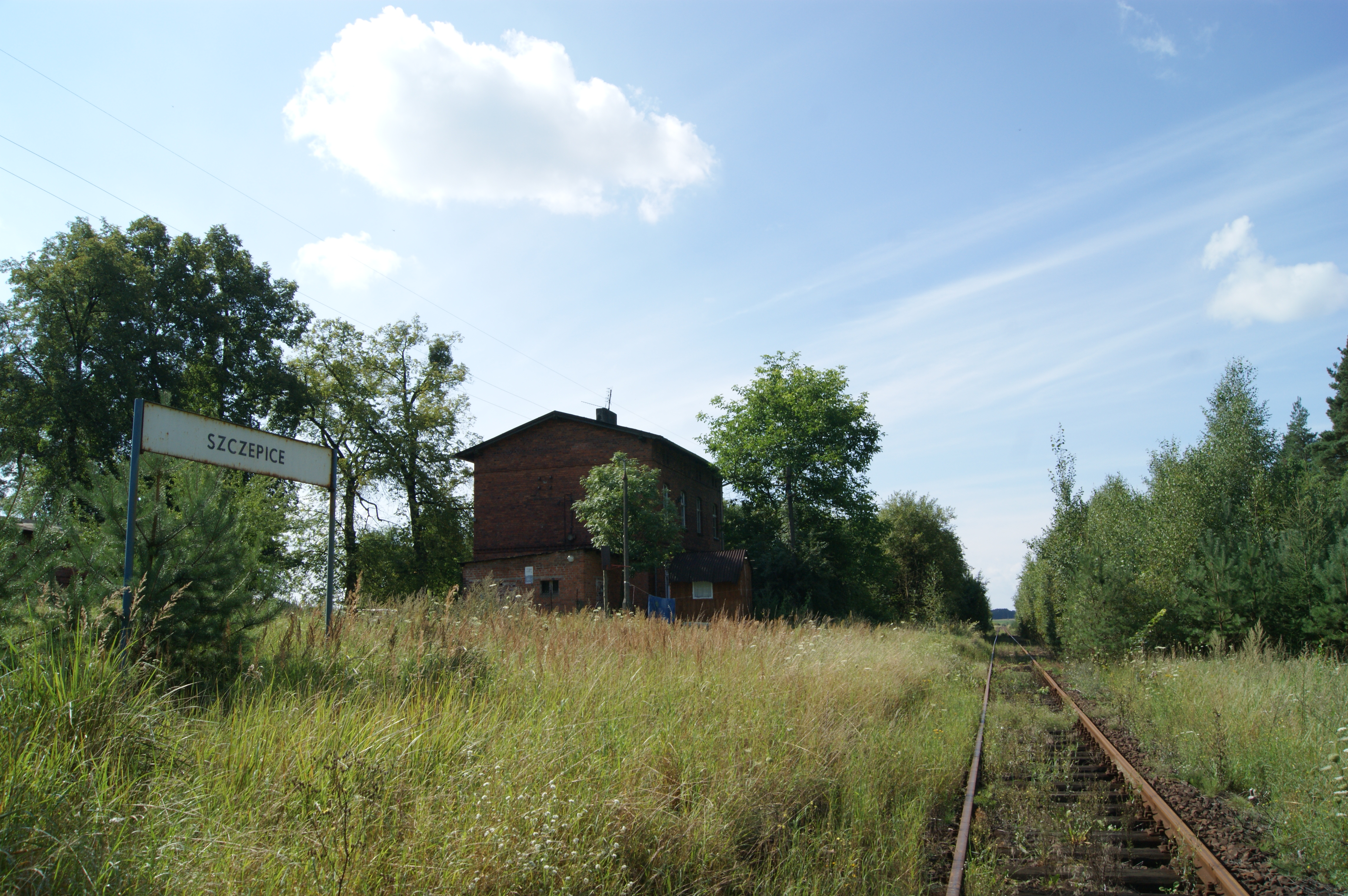 Szczepice